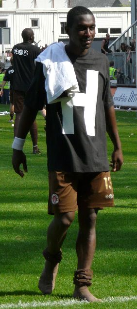 Charles Takyi